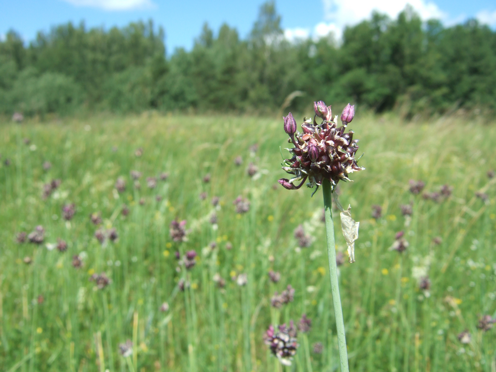 Dirvinis česnakas Minijos senslėnio kraštovaizdžio draustinyje